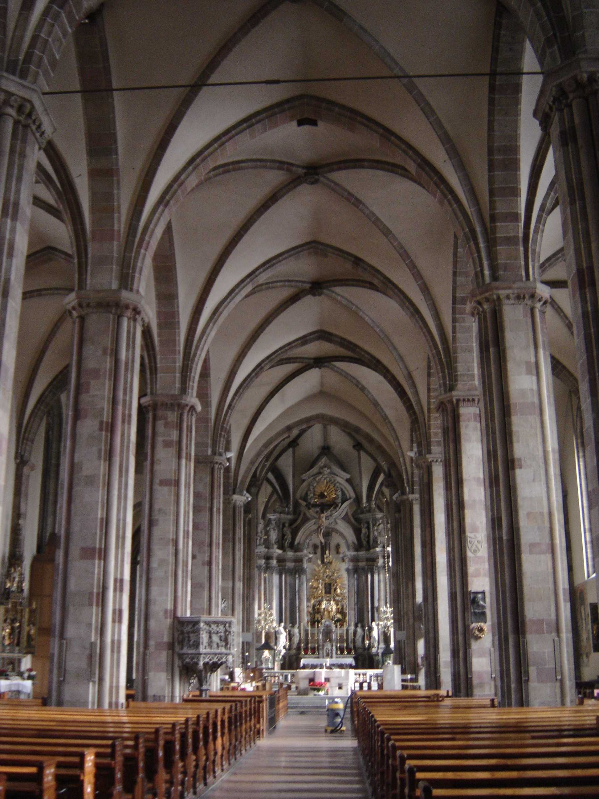 Nef principale de la cathédrale de Bolzano (Alto Adige - Italie)